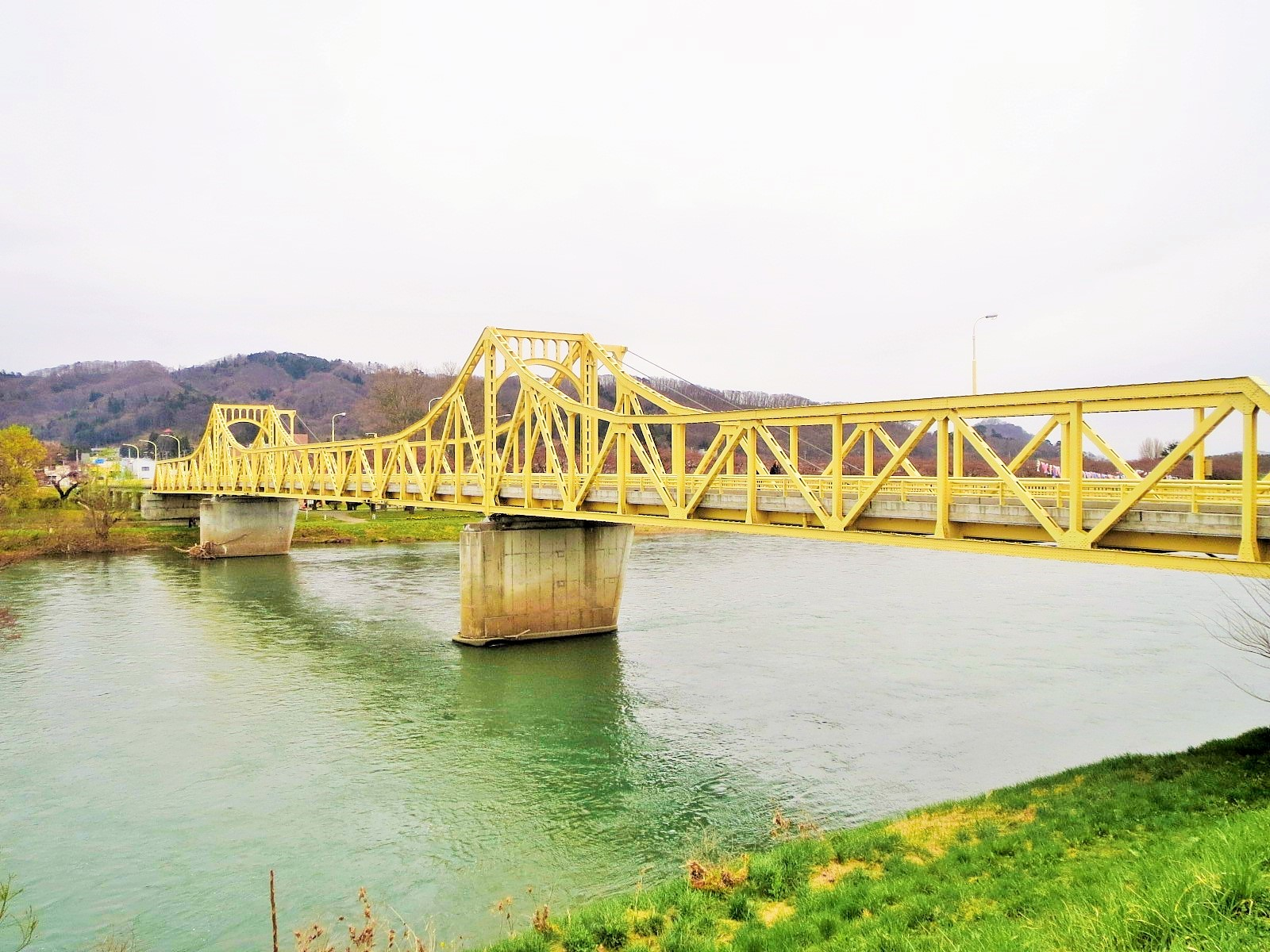 北上川に架かる珊瑚橋 Canon IXY 3